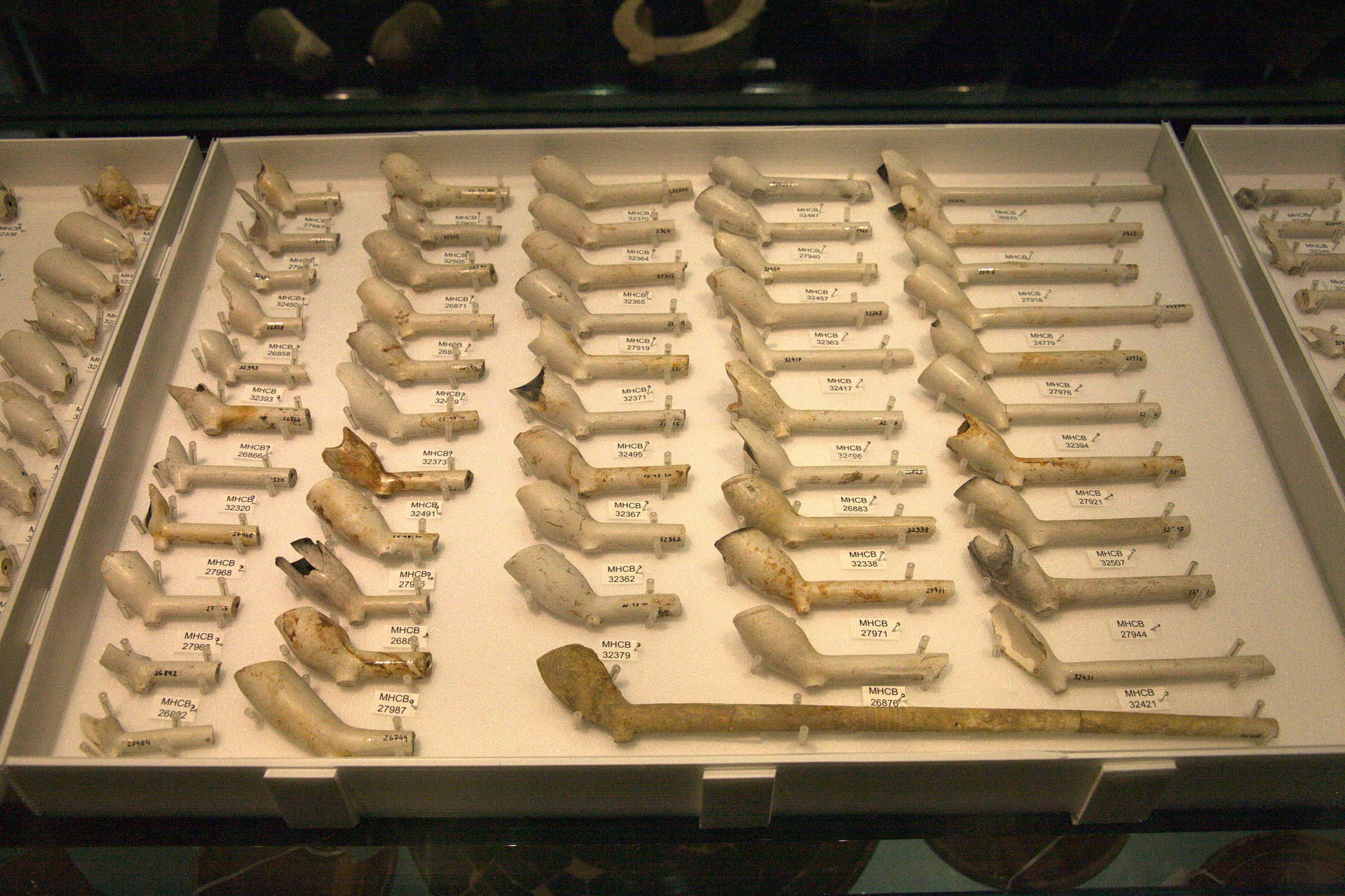 Jaciment arqueològic del Born (Barcelona, 1717). Pipes de fumar